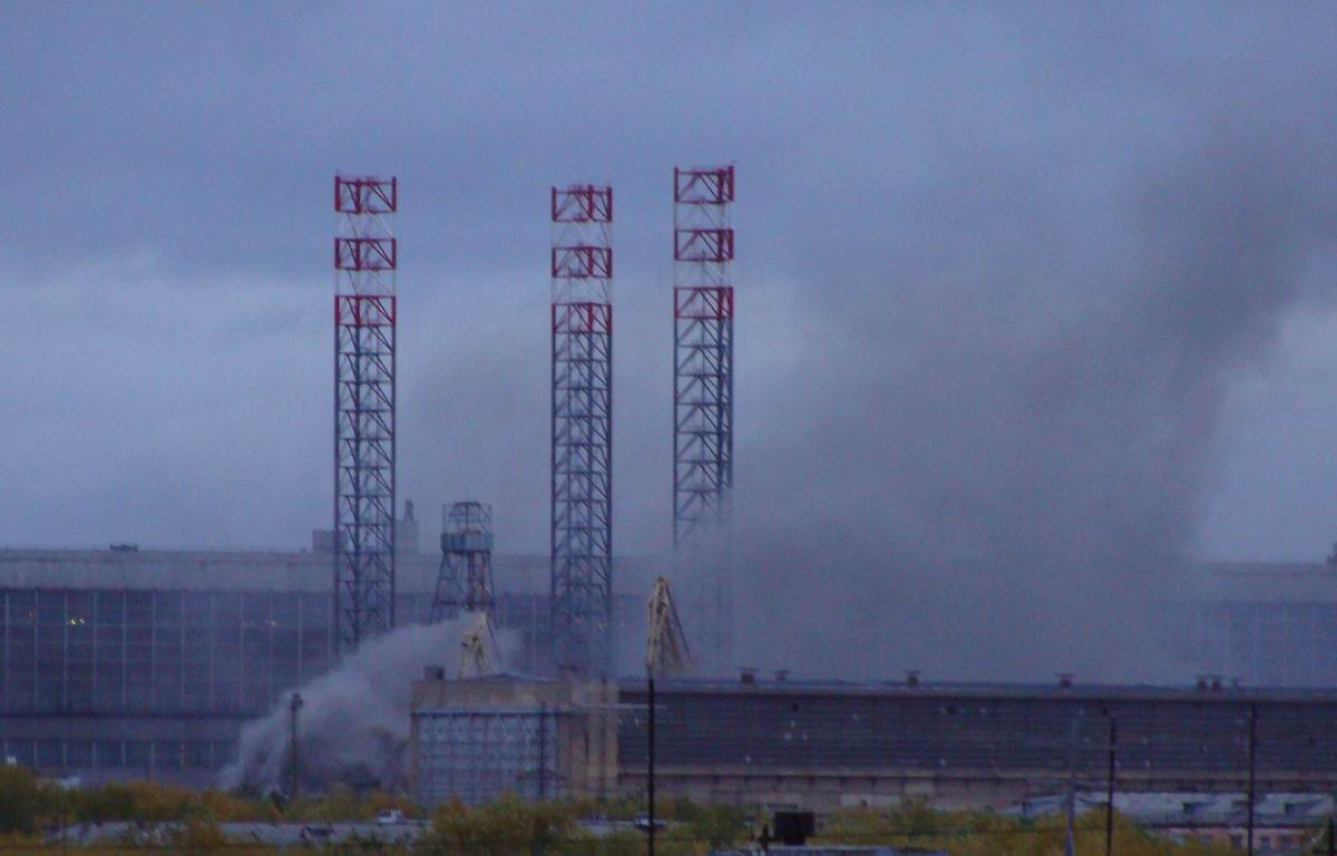 Пожар на «Звездочке», на утилизируемой АПЛ «Казань» 6 октября 2009 года. Возгорание изоляционных материалов произошло в в 17.35. Причиной возгорания стали проводимые в носовой части подлодки газорезательные работы по демонтажу гидроакустического комплекса.